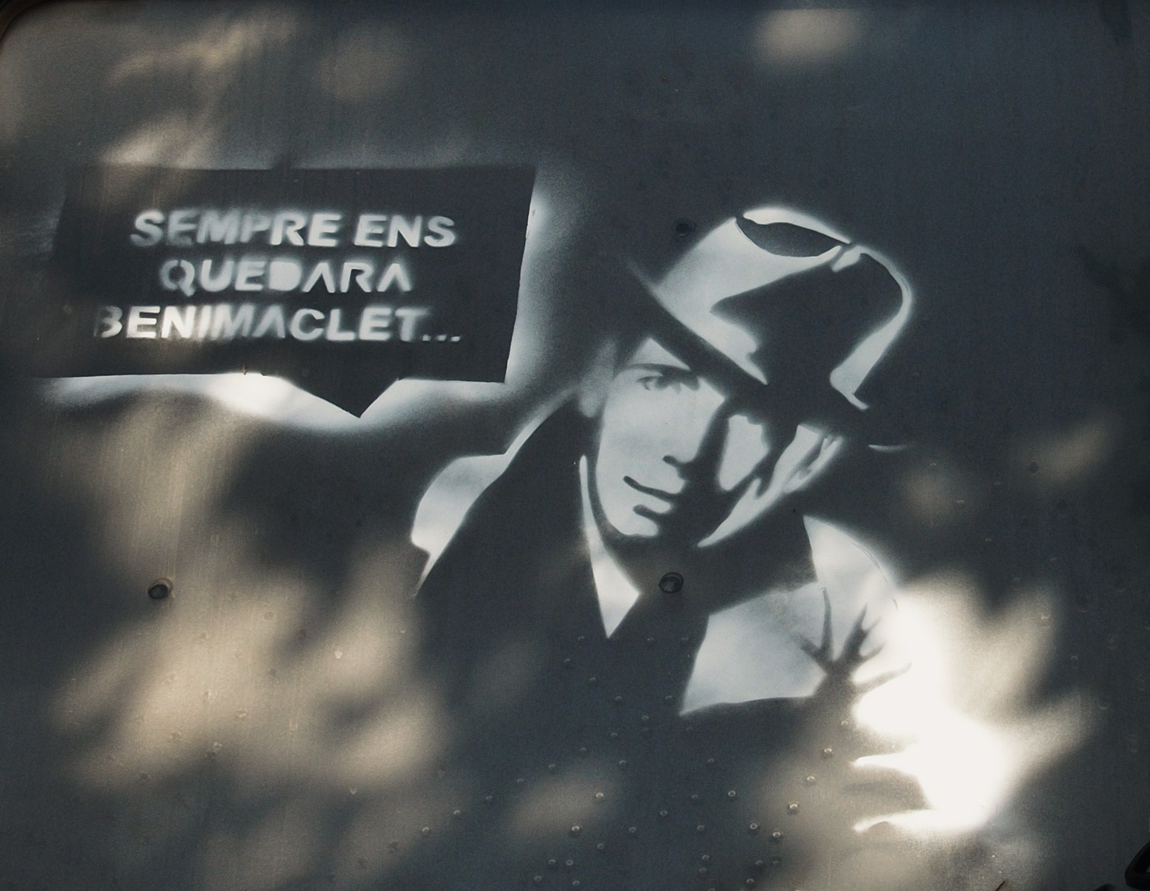 Plantilla a Benimaclet que diu: Sempre ens quedarà Benimaclet ...